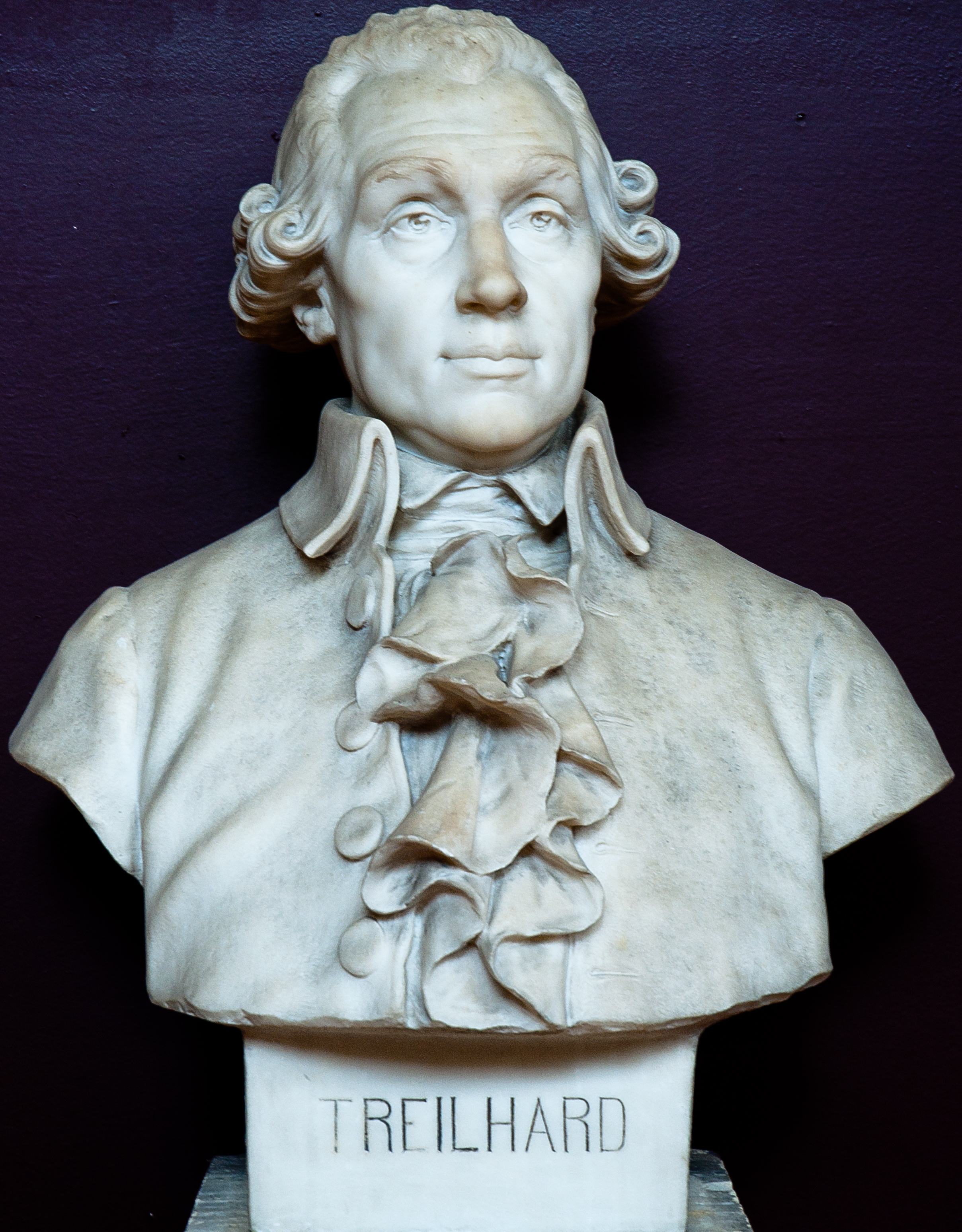 Auguste Maillard (1864-1944), Buste de Jean-Baptiste Treilhard, Salon de 1893, marbre, Versailles, salle du Jeu de paume.